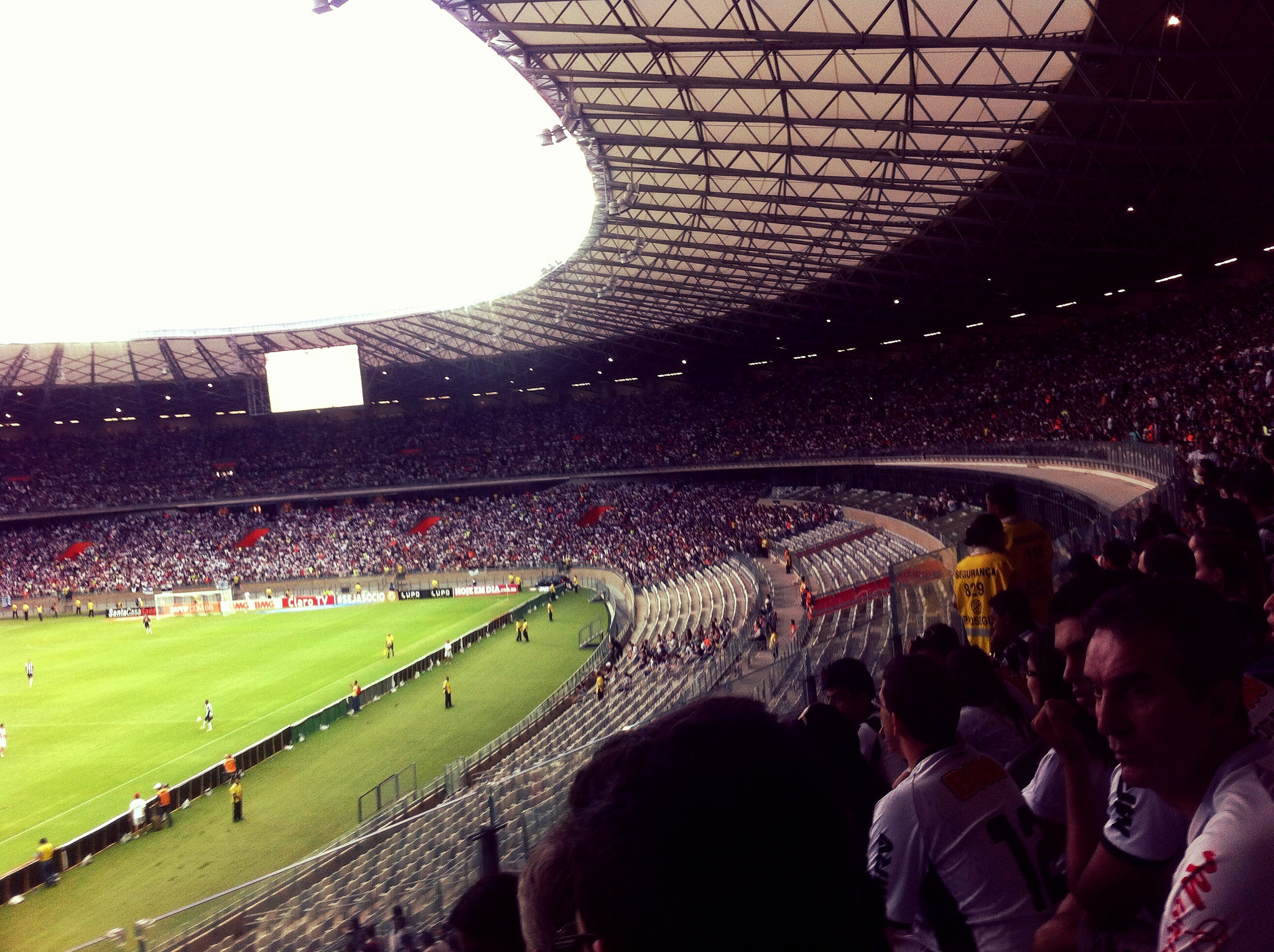 Atlético-MG vs Villa Nova.